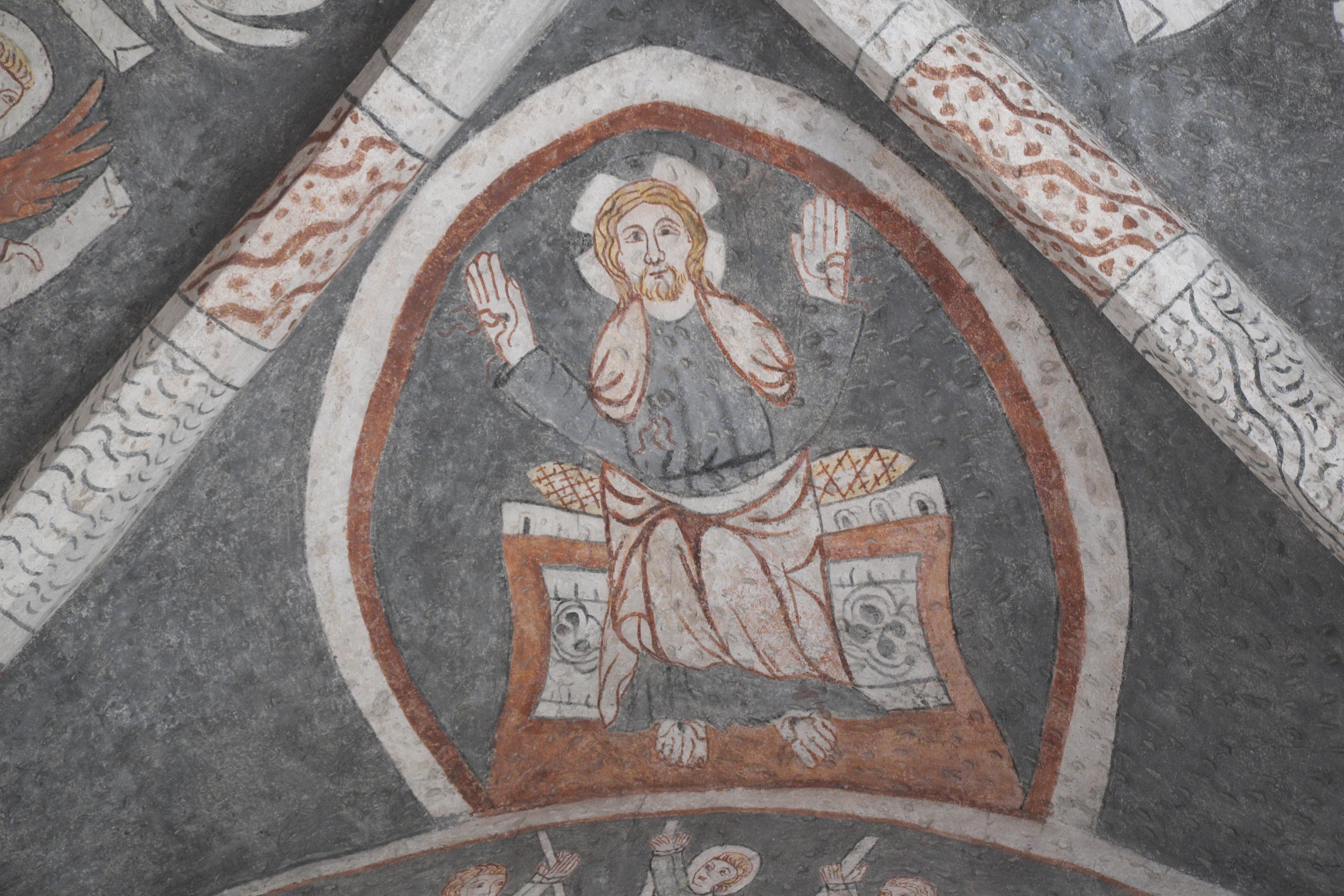 Katholische Pfarrkirche St. Vitus in Kottingwörth (Beilngries) im oberbayerischen Landkreis Eichstätt (Bayern/Deutschland), Wand- und Deckenmalereien in der Vituskapelle, in Fresko- und Seccotechnik, wohl nach 1313 entstanden